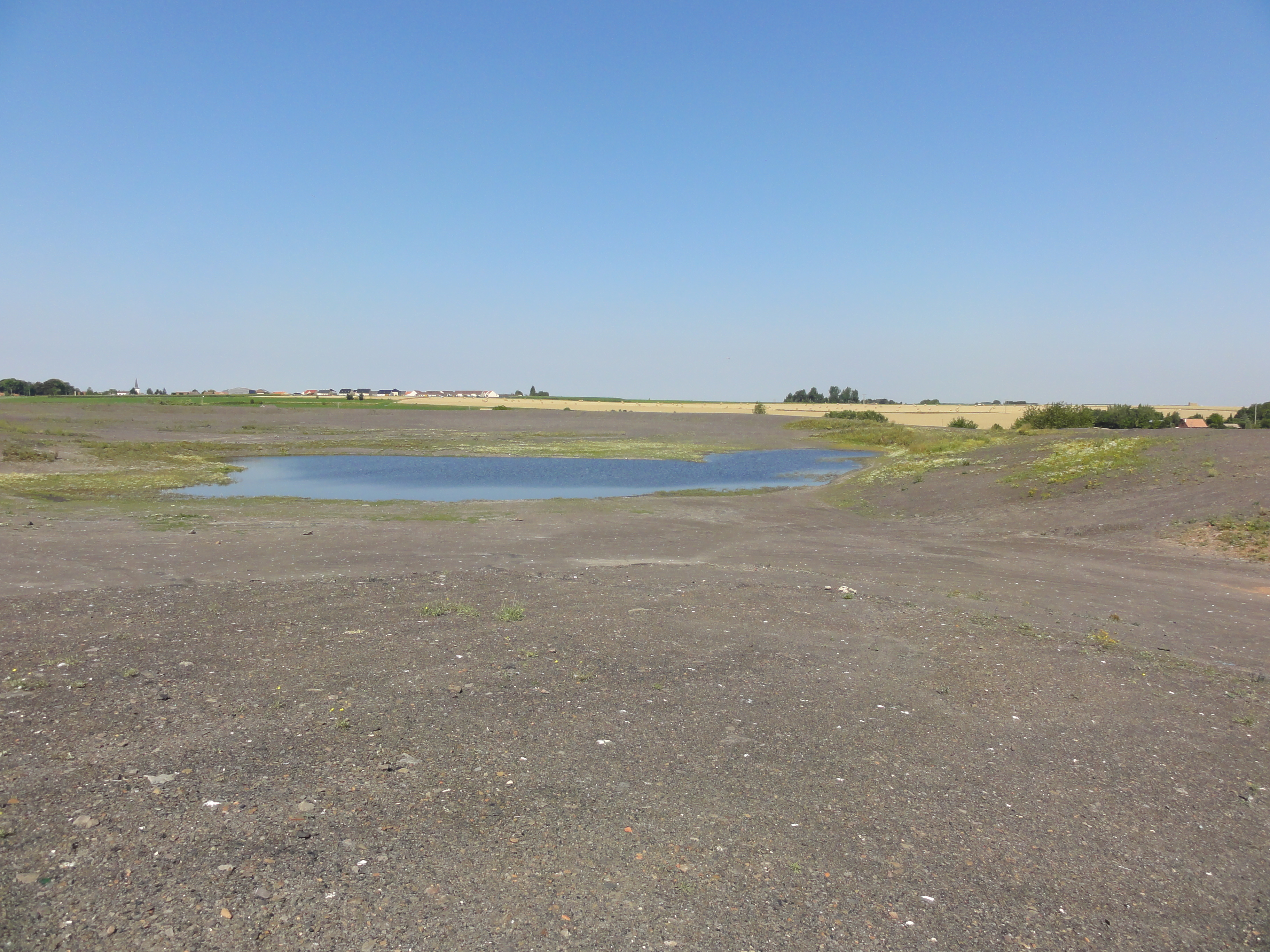 Terril n° 55 dit 13 de Nœux, Fosse n° 13 - 13 bis du Groupe de Béthune, Hersin-Coupigny et Sains-en-Gohelle, Pas-de-Calais, Nord-Pas-de-Calais, France.